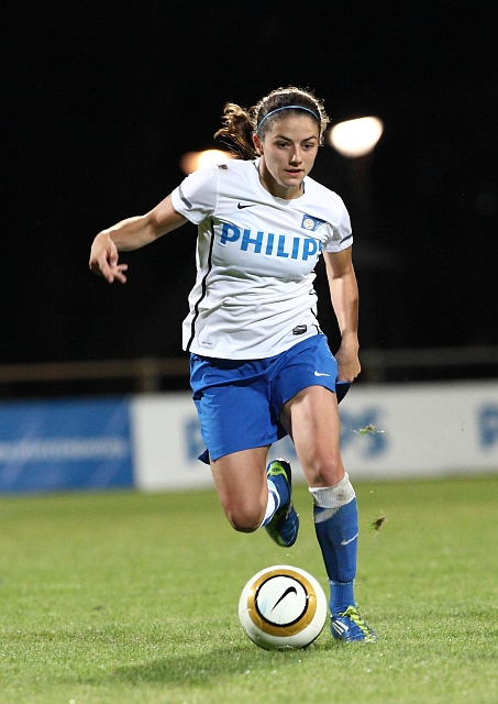 Danielle van de Donk van PSV/Fc Eindhoven tijdens de wedstrijd tegen Sc Heerenveen 21-9-12